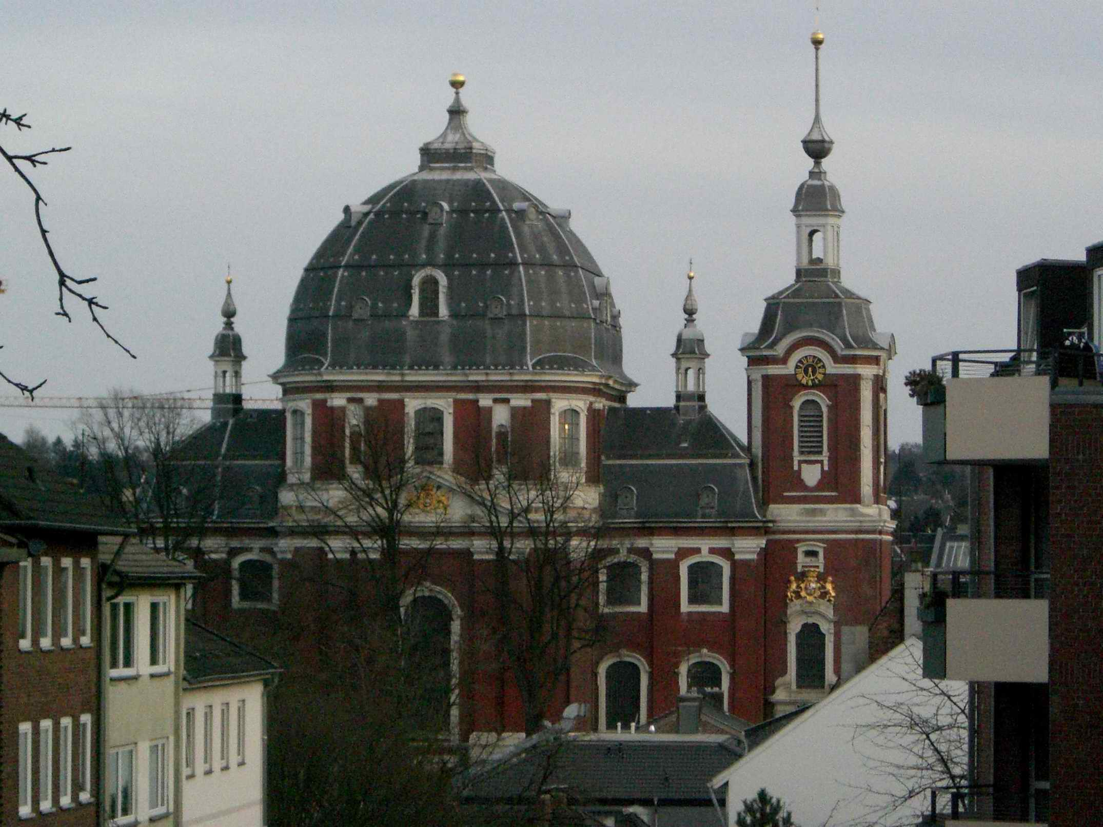 Burtscheid Abbey church seen from the northwest (Hauptstraße).